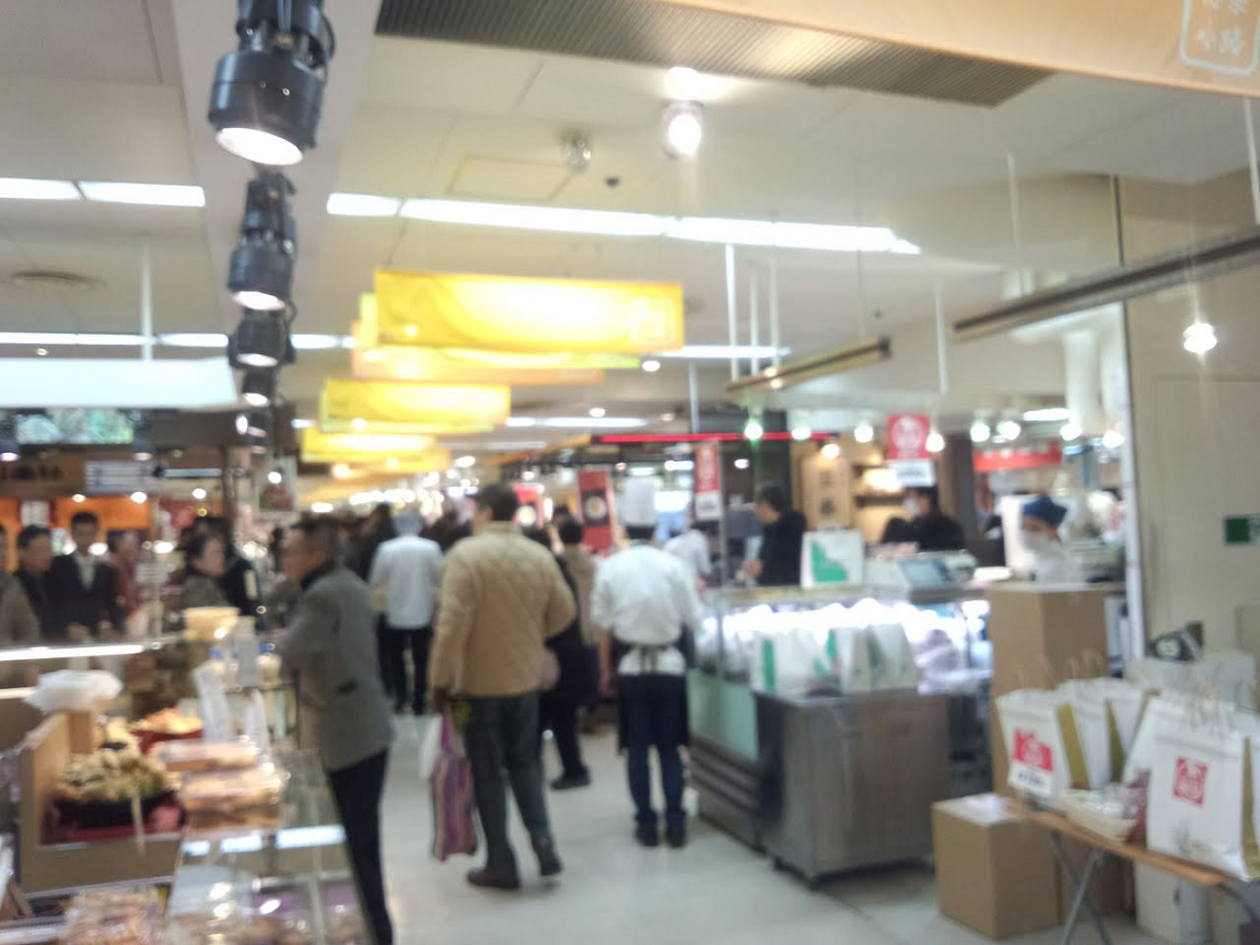 阪神百貨店梅田本店地下1階食料品売り場